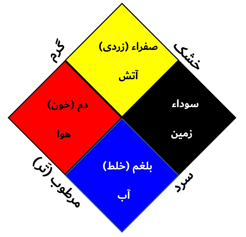 توضیح تصویری مزاجها و طبایع علم پزشکی